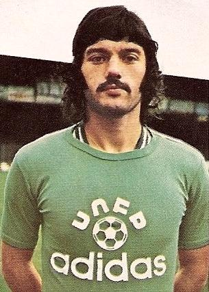 Jacques Santini en 1974, 'Ageducatifs Football 1974 - 1975', Panini figurina